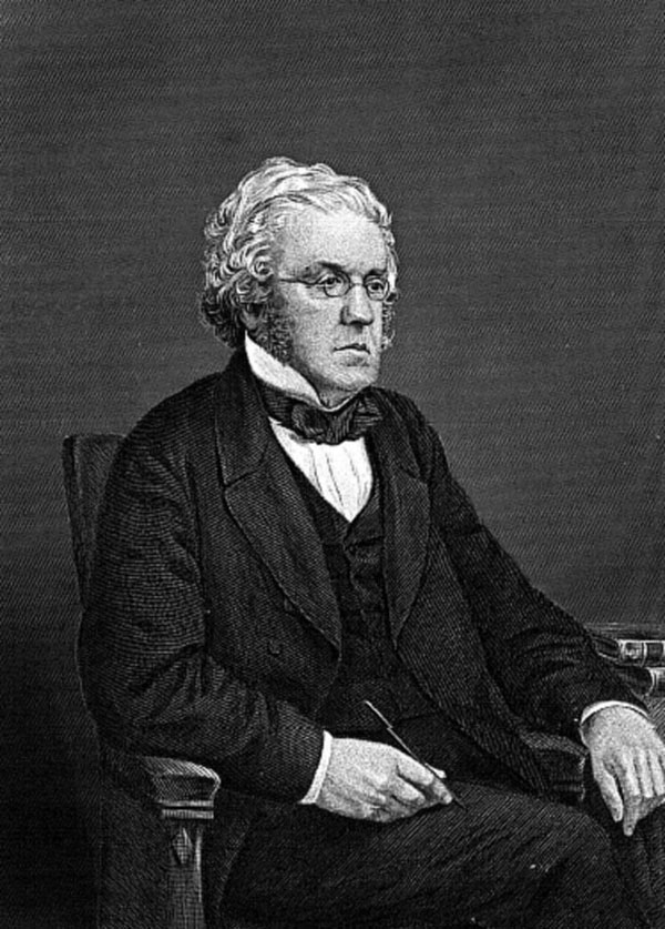 William Makepeace Thackeray